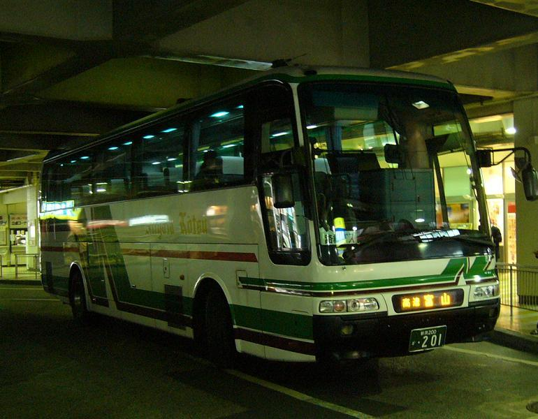 新潟200か・201。新潟交通所属富山 - 新潟線用。万代シティバスセンターにて撮影。